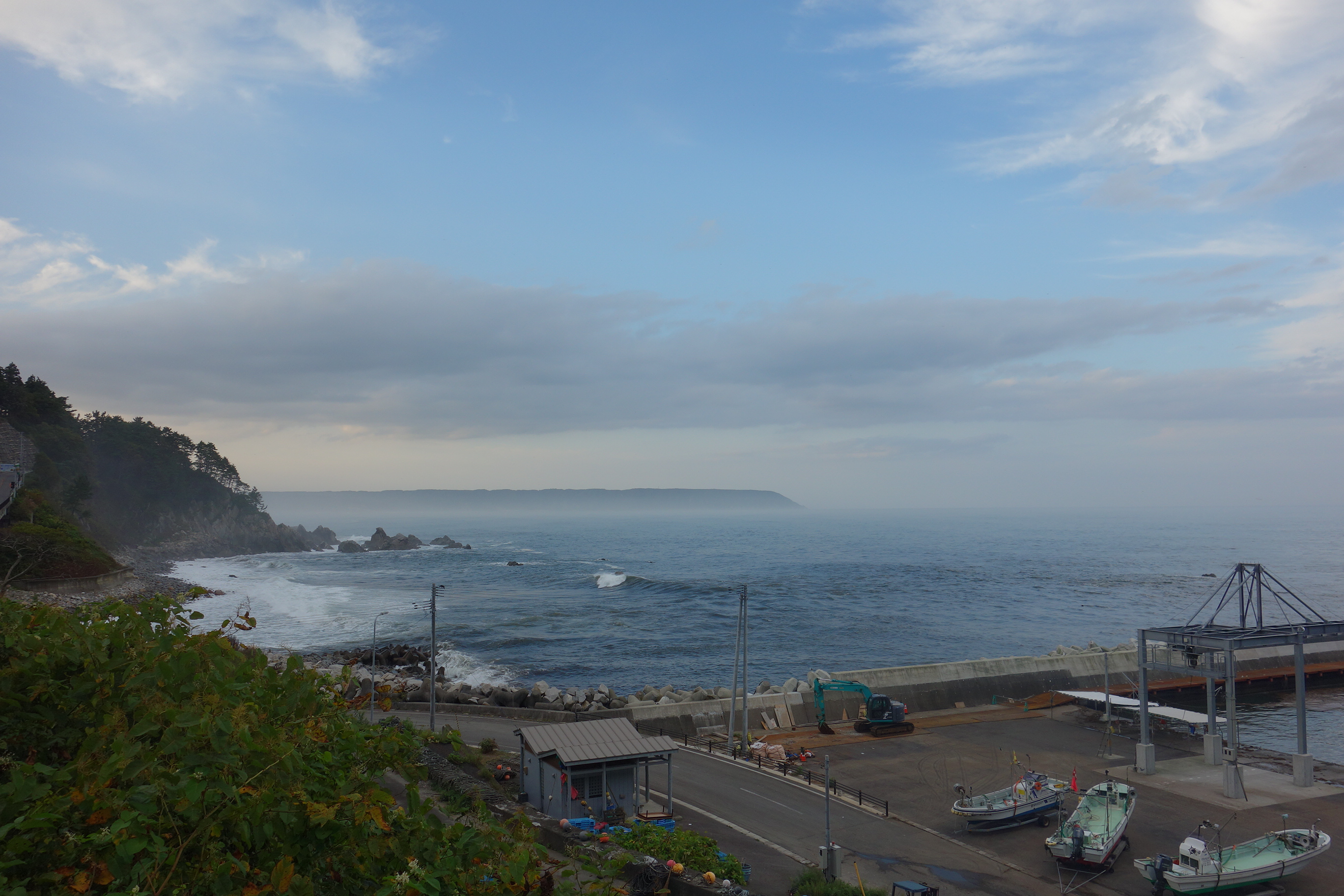 野田湾(野田村玉川)